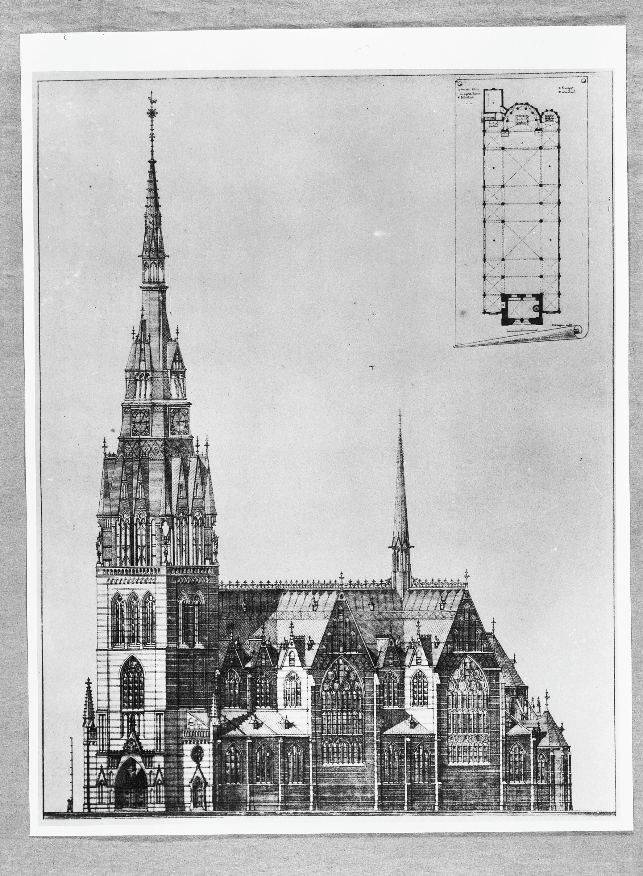 St.Hippolytuskerk: reproductie uit gedenkboek "Het werk van Dr.P.J. 1828-1917, ontwerptekening